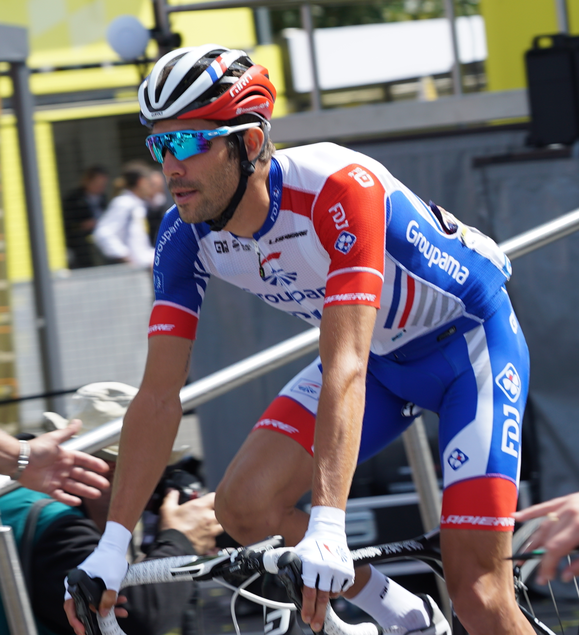 signature avant le départ d'étape à Reims.